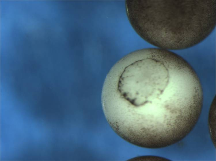 Oocito/embrión de Xenopus laevis